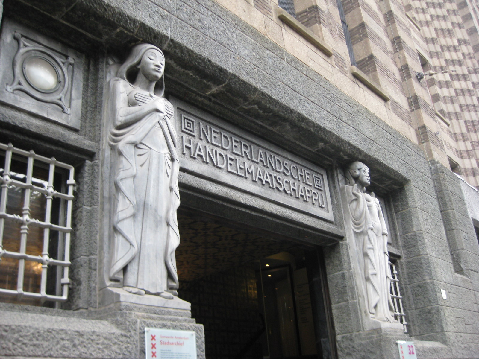 Gevelbeelden ingang Gebouw De Bazel, Amsterdam. Insulinde en Europa, beeldhouwer Joseph Mendes da Costa